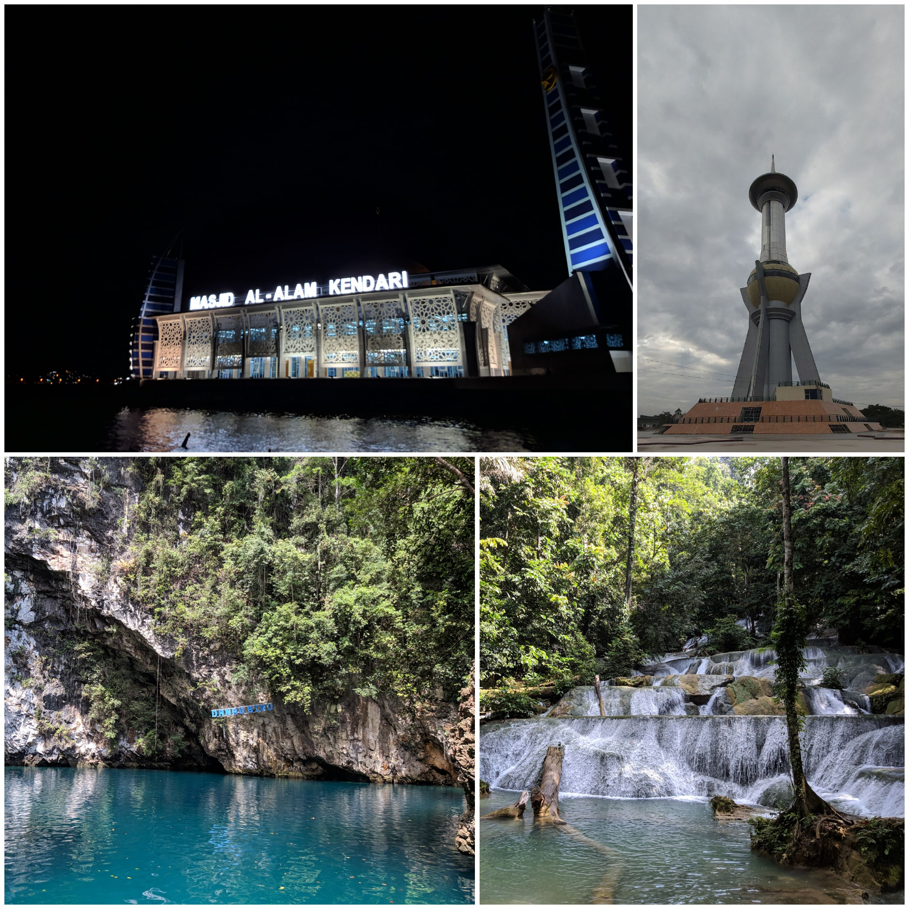 Dari Kiri atas ke kanan: Masjid terapung Al-Alam, Tugu Persatuan MTQ, Danau Biru Kolaka Utara, Air Terjun Moramo Konawe Selatan